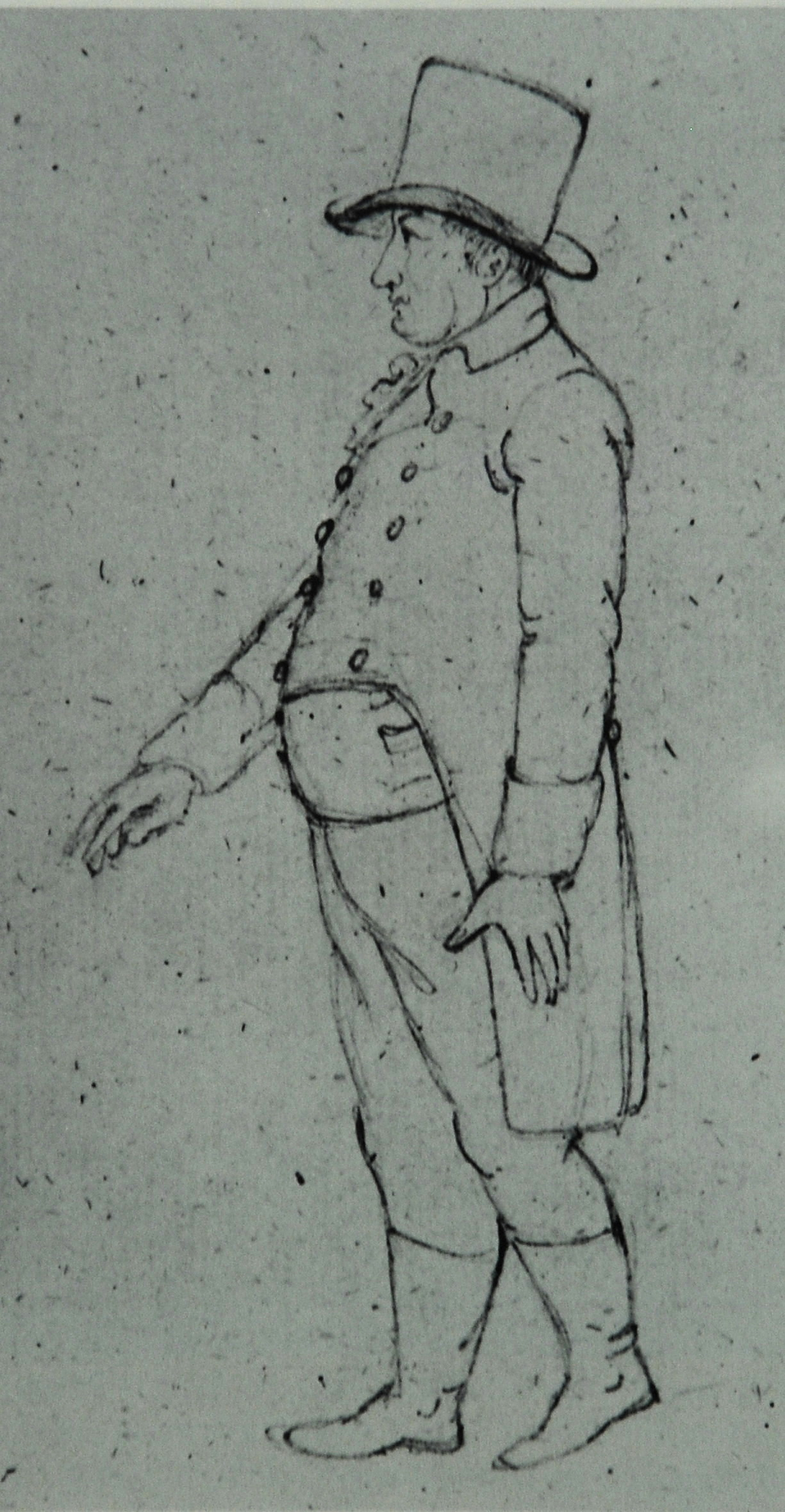 Riemer, Friedrich Wilhelm (um 1810): Goethe auf der Straße. Bleistiftzeichung16,6x 11,3cm. Wenngleich die Zeichnung von keinem Künstler stammt, so ist sie doch bei aller Unbeholfenheit einige der wenigen ganzfigurigen Darstellungen aus der späteren Lebenszeit Goethes. Graf Eugen Czernin vermerkt in seinem Tagebuch vom 4. und 5. 8. 1810: „Er ist nun schon gegen 60 Jahre alt, nicht groß.“ Im selben Jahr beschrieb Andreas von Merian seine Erscheinung: “Goethe war einfach angezogen, trug Stiefel, runden Hut, seine Orden. Seine Haare sind schwarz und grau untermischt. Seine Gestalt ist ansehnlich, gerade, fast zurückliegend; sein ganzer Anstand männlich, ehr ernst, beinahe trocken.“ (Schaeffer, E. und J. Göres: Goethe. Seine äußere Erscheinung. Frankfurt am Main: Insel 1980, S. 125)